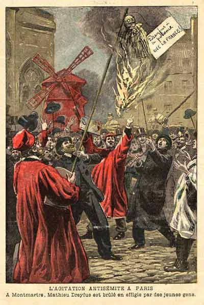 Titre : L'Agitation antisémite à Paris Légende : A Montmartre, Mathieu Dreyfus est brûlé en effigie par des jeunes gens. Agitation antisémite - Affaire Dreyfus